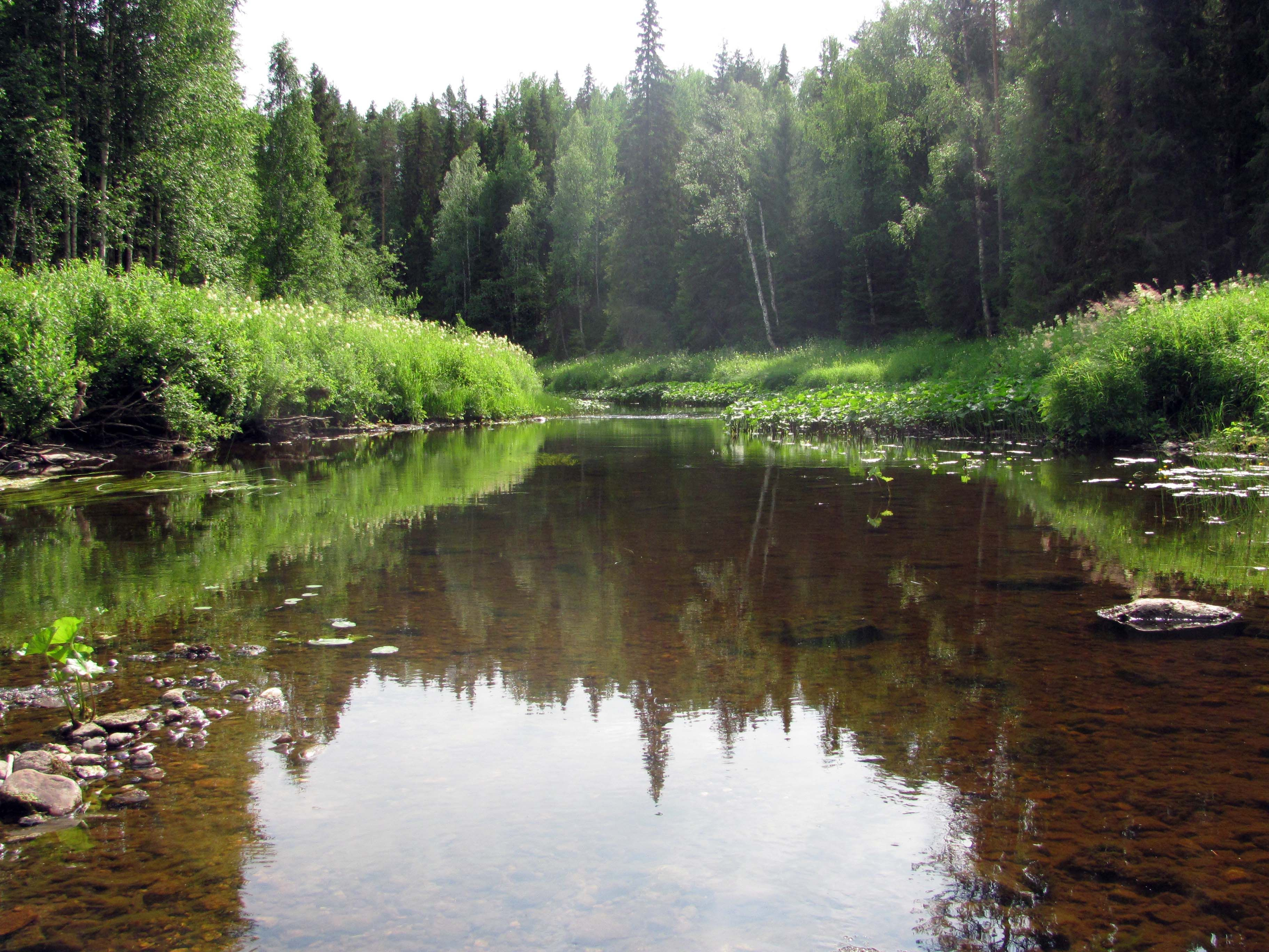 река Суланда в верхнем течении